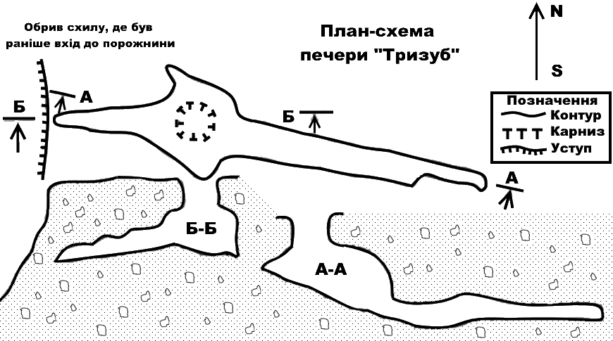 Мапа печери «Тризуб» в Ягільниці Чортківського району Тернопільської області.